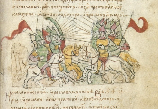 Фрагмент иллюстрации из Радзивилловской летописи